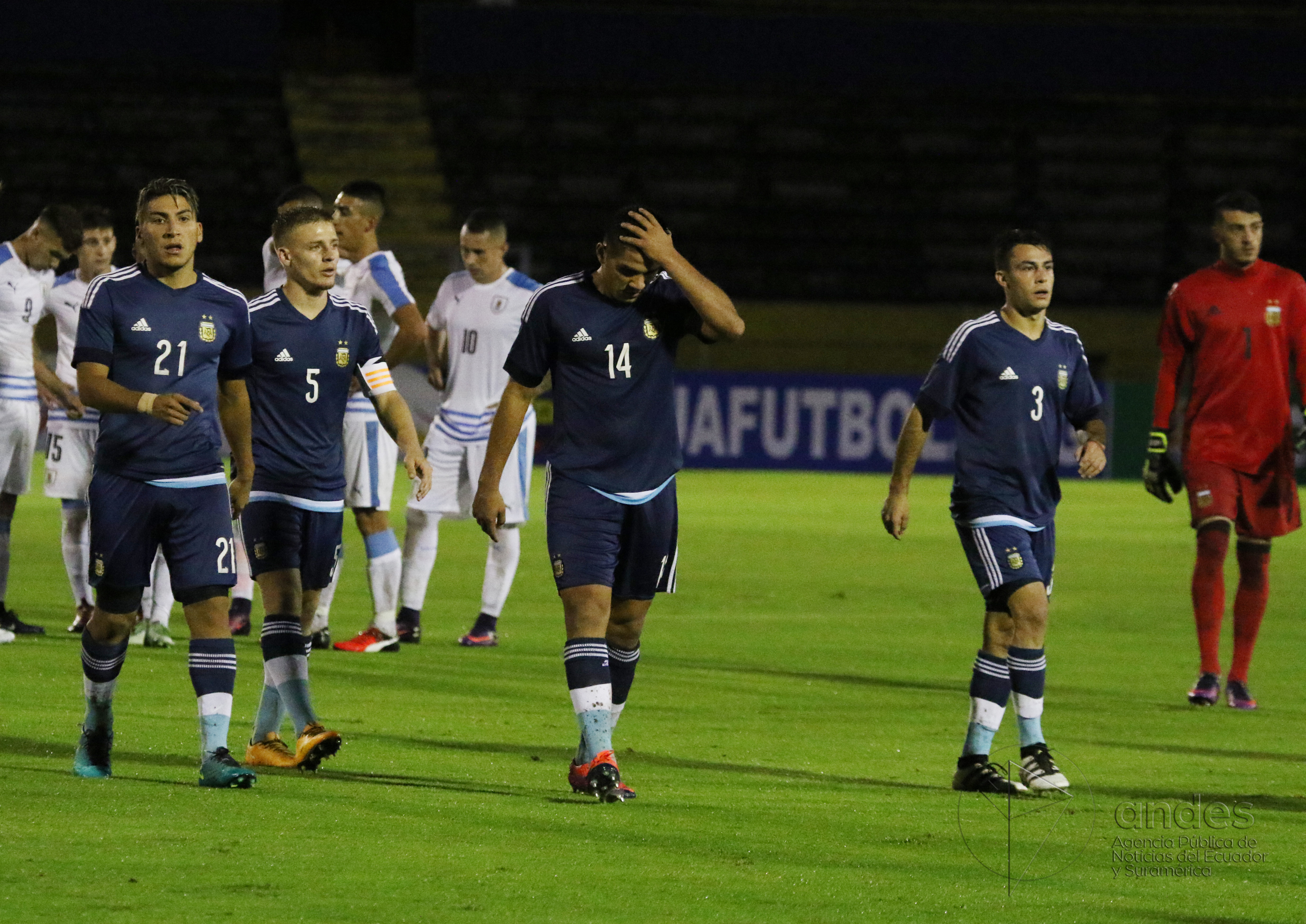 ARGENTINA URUGUAY 3 MAV